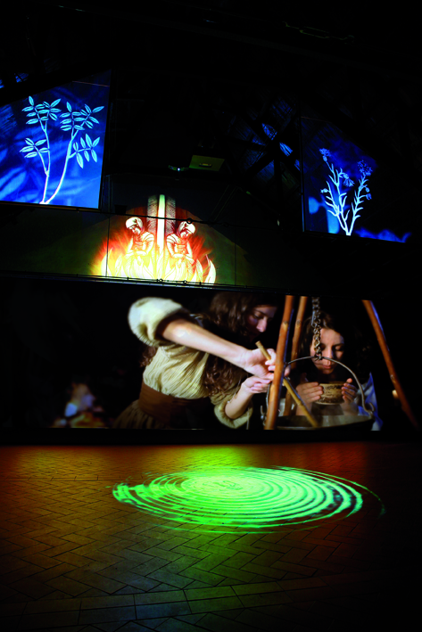 Espai Bruixes